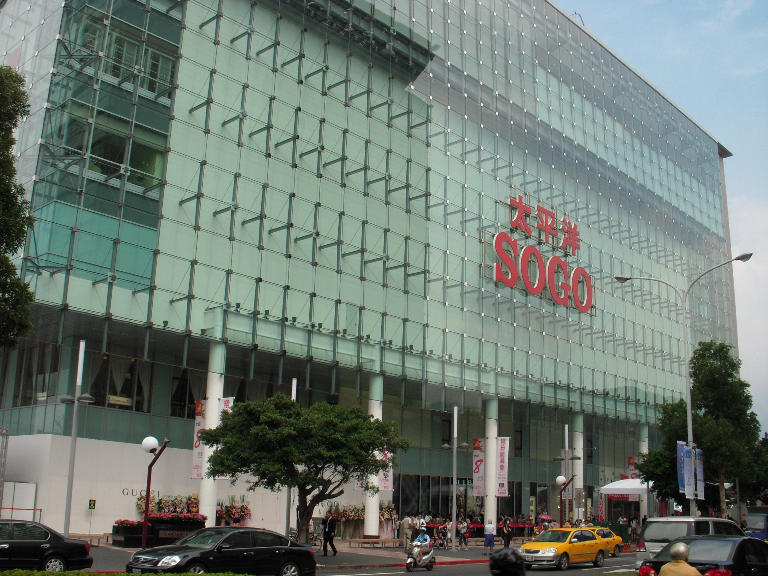 太平洋崇光百貨台北天母店